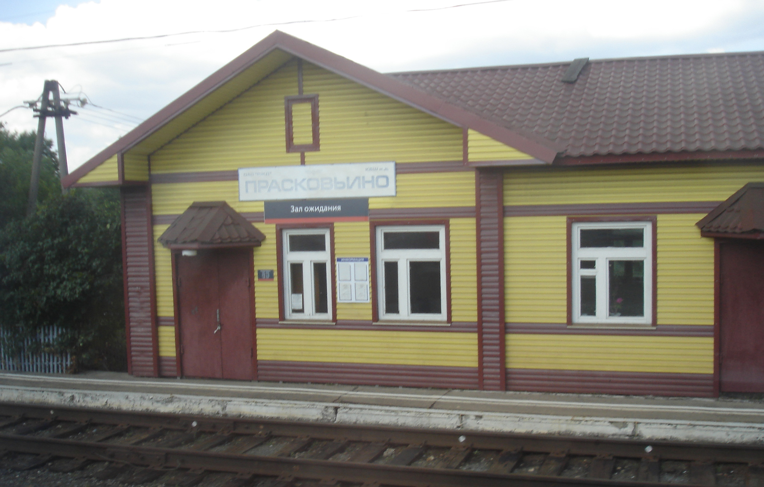 Здание станции в 2014 году (есть новая табличка РЖД)